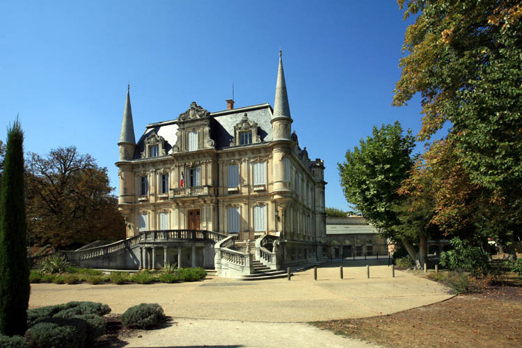 Château de Val-Seille - the village of Courthézon, Vaucluse, France